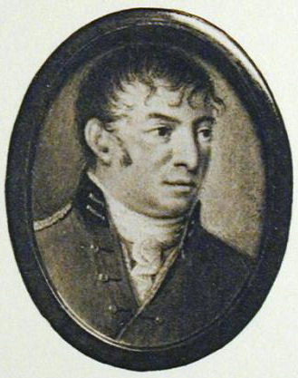 Kniaz' Vladimir Mikhailovich Iashvil', 1764-1815; Aleksandr Alekseevich Zherebtsov, 1754-1807; Petr Aleksandrovich Talyzin, 1761-1801; Graf Pavel Ivanovich Tizengauzen, 1774-1862; Gustav-Georgii fon-Fel'kerzam, 1734-1801